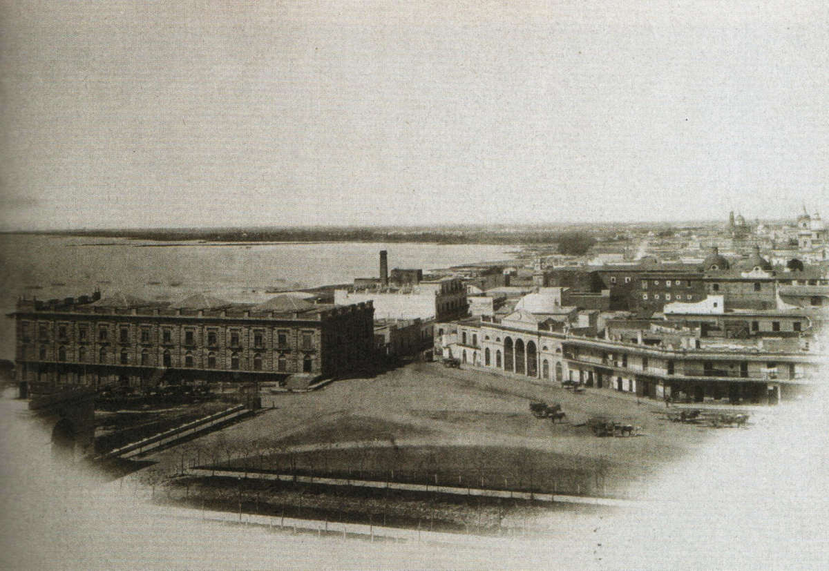 Plaza de Mayo, en la Ciudad de Buenos Aires. A la izquierda puede verse la entrada al viejo fuerte, y el edificio con arcos, ubicado en el centro, es el antiguo Congreso Nacional.